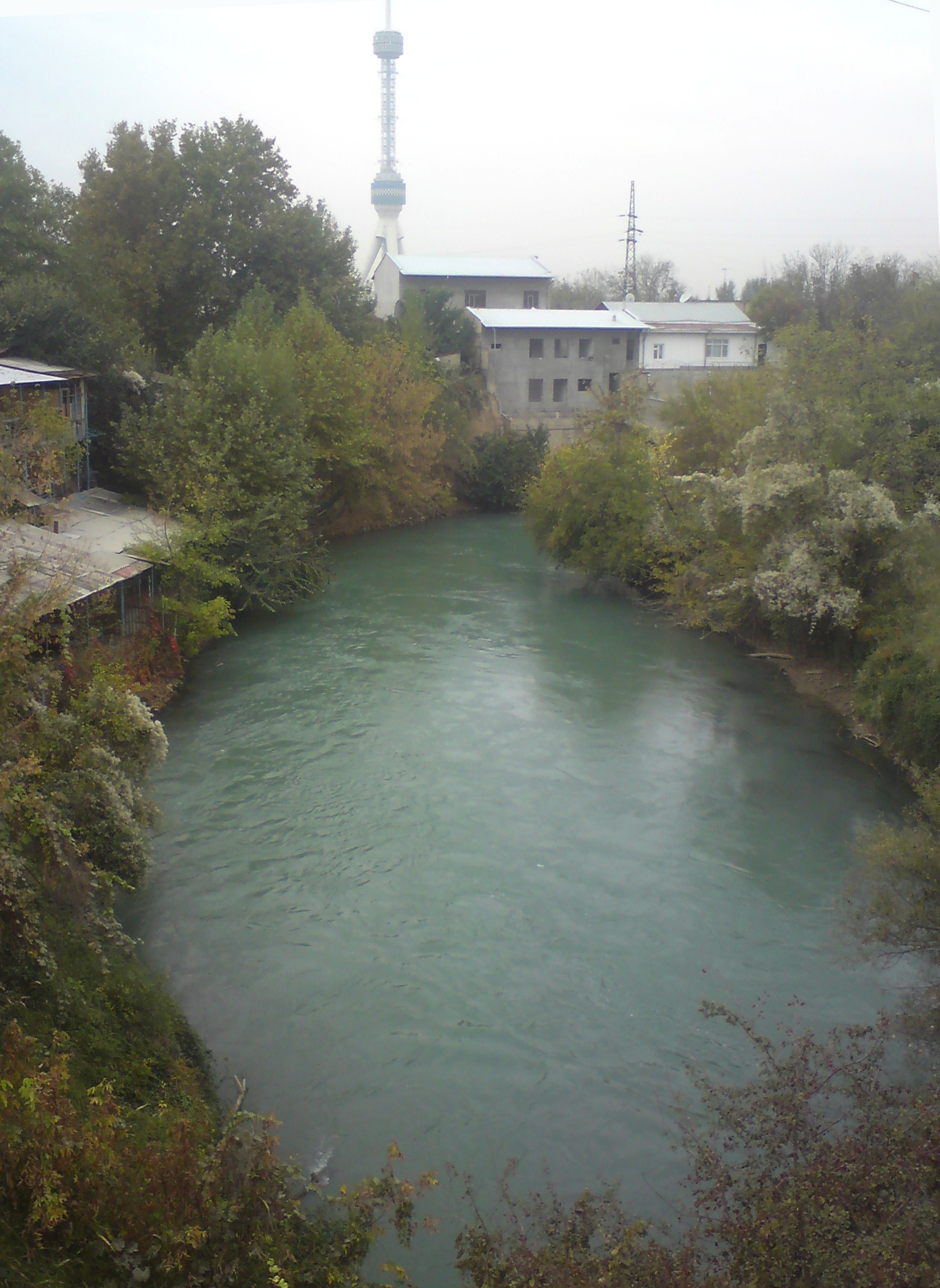 канал Бозсу у пересечения с железной дорогой "Ташкент - Москва" (г. Ташкент)